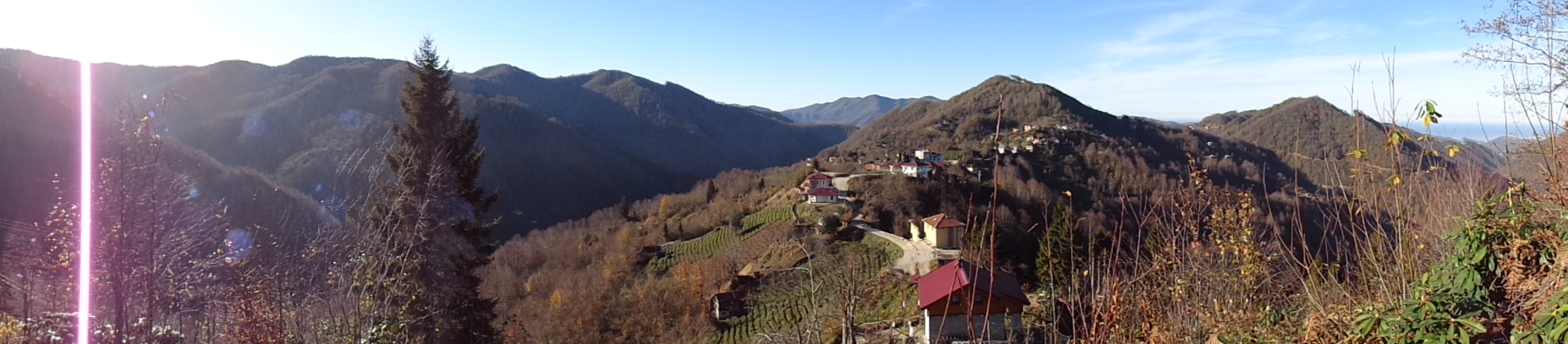 Rize'nin Pazar ilçesine bağlı Uğrak köyü.